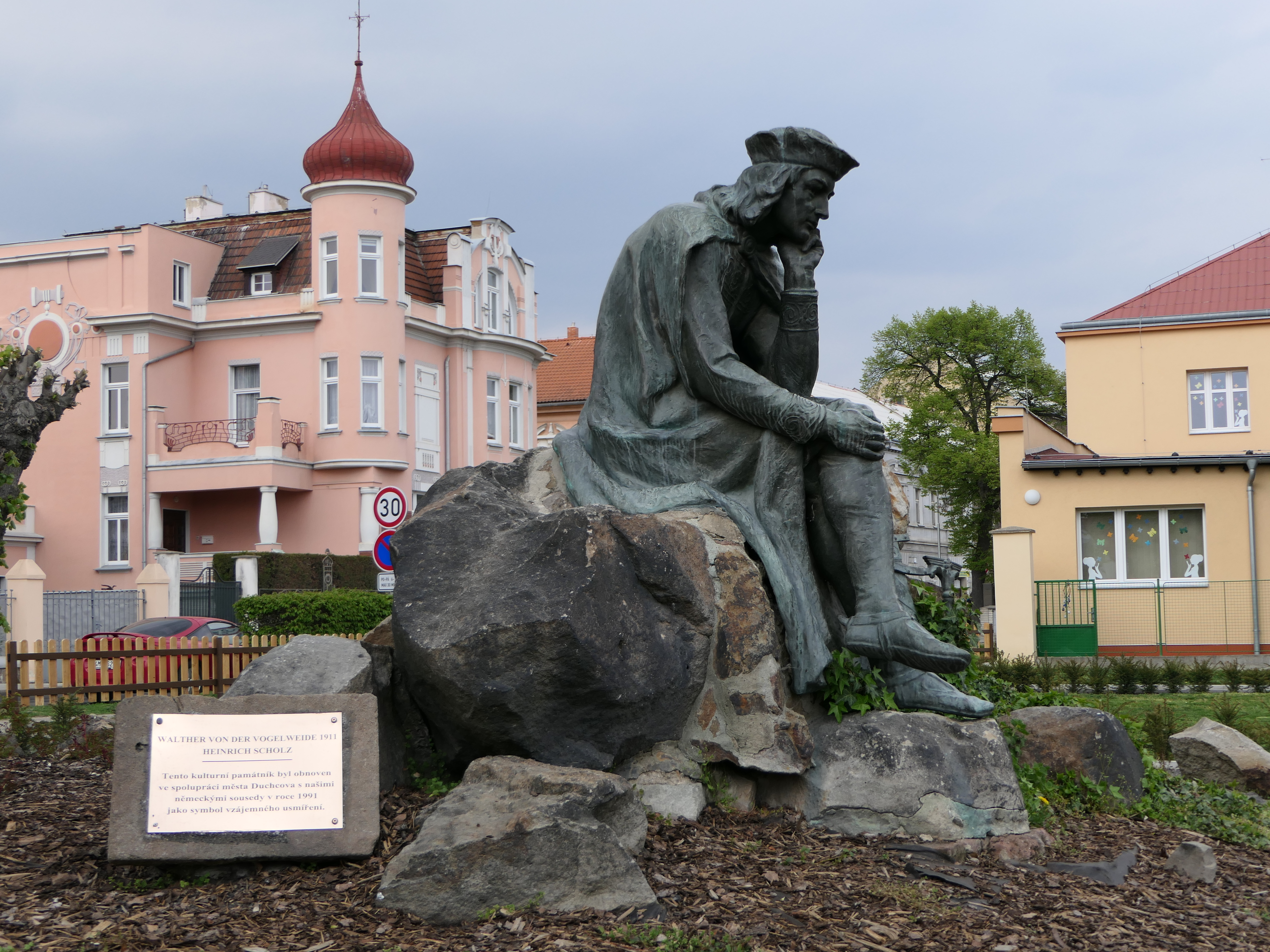 Denkmal für Walther von der Vogelweide in Duchcov, geschaffen von Heinrich Karl Scholz, 1911